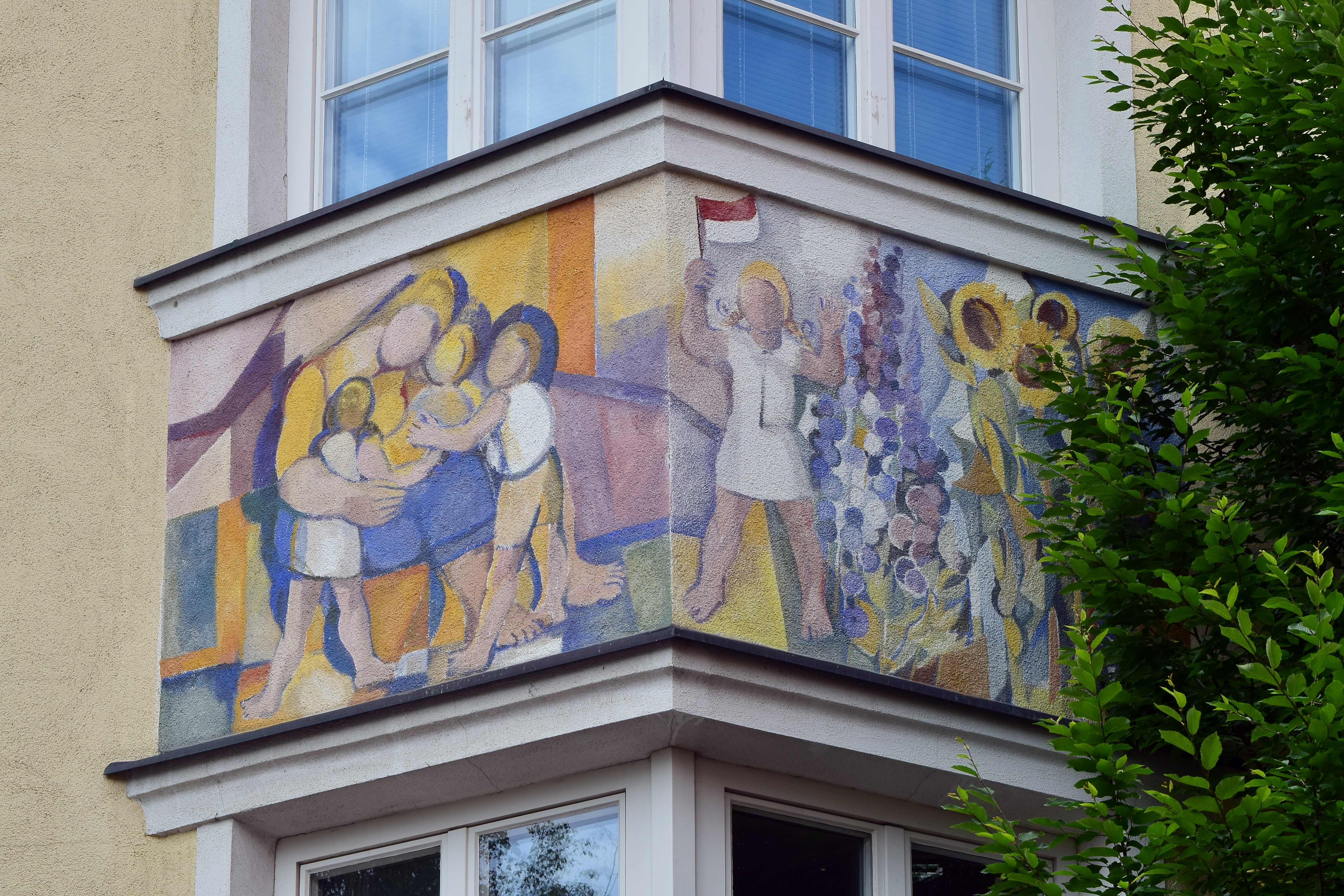 Luise-Wallnöfer-Haus / Alte Haushaltungsschule